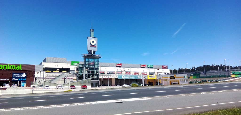 Polígono de Iñás, Oleiros.